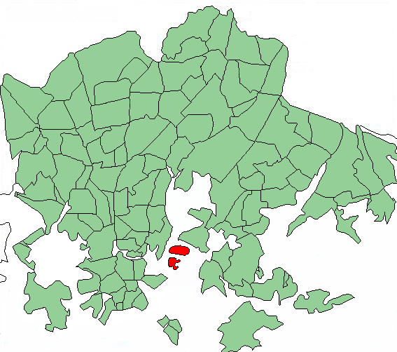 Map of Helsinki highlighting Mustikkamaa-Korkeasaari